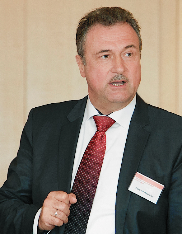 Claus Weselsky, hier auf der Fachtagung "Streikrecht-Tarifeinheit-Gewerkschaftspluralismus" der Rosa-Luxemburg-Stiftung am 13. April 2015 in Erfurt, Deutschland (siehe auch